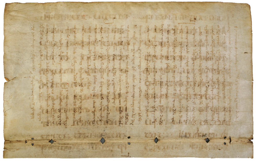 ხანმეტი ოთხთავი